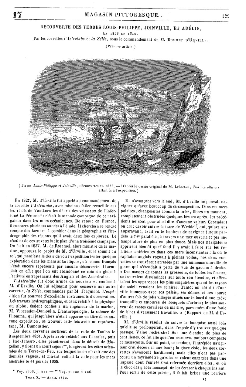 Jules Dumont d'Urville, Découvertes de 1838 et 1840, Le Magasin pittoresque, 1842, page 129. Illustration de Louis Le Breton.